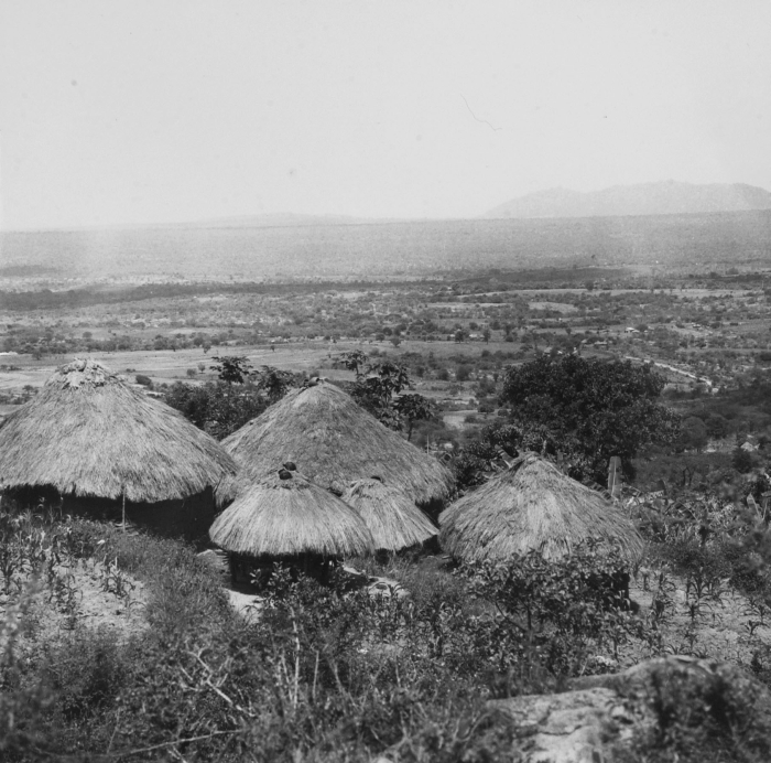 De Kamba bevolking van Machakos behoort tot het onderzoeksgebied van het K.I.T. Medical Research Centre in Nairobi.